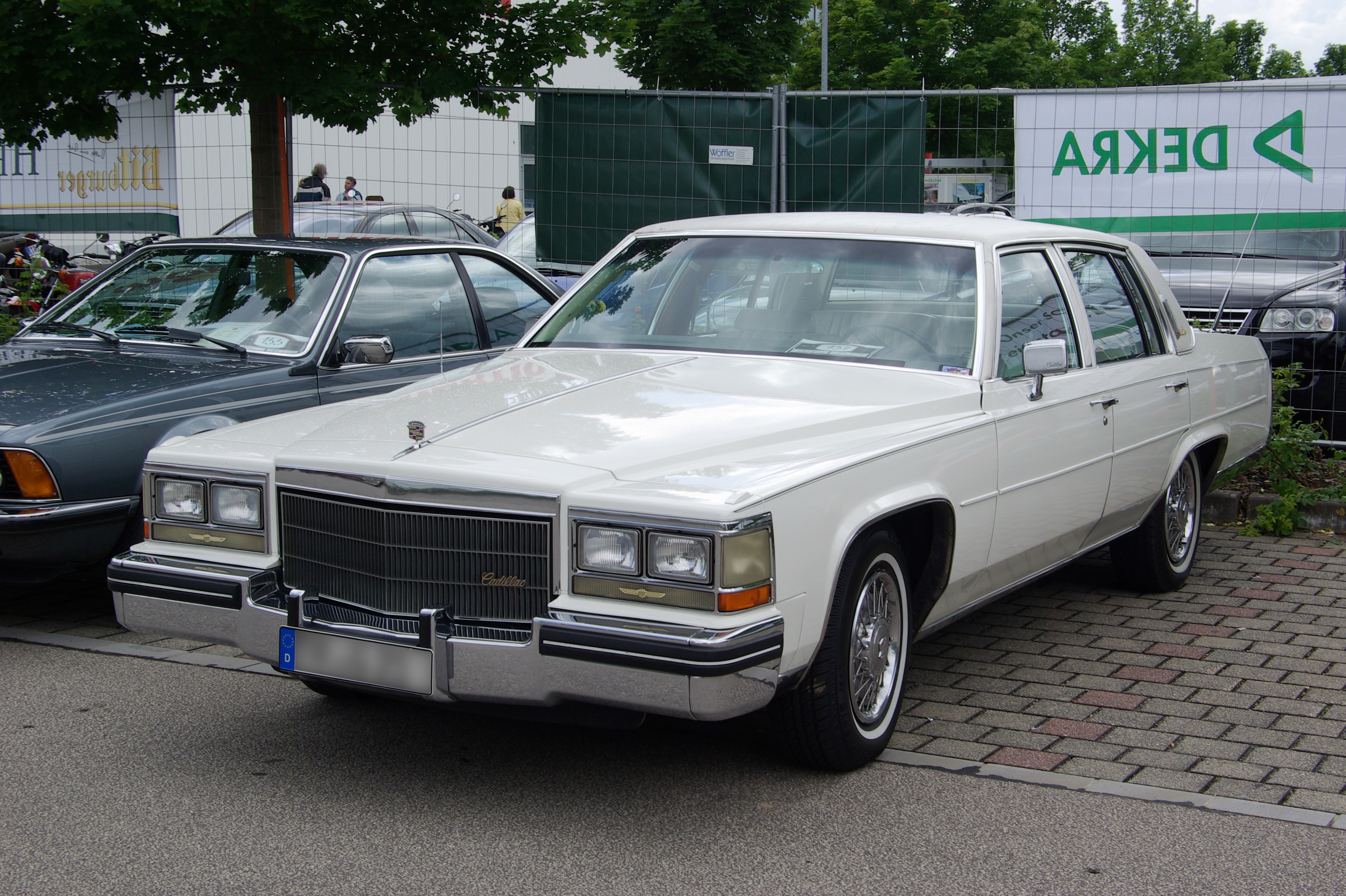 Cadillac Sedan de Ville, Baujahr 1984, 140 PS, 28. Internationales Oldtimer-Treffen, Konz